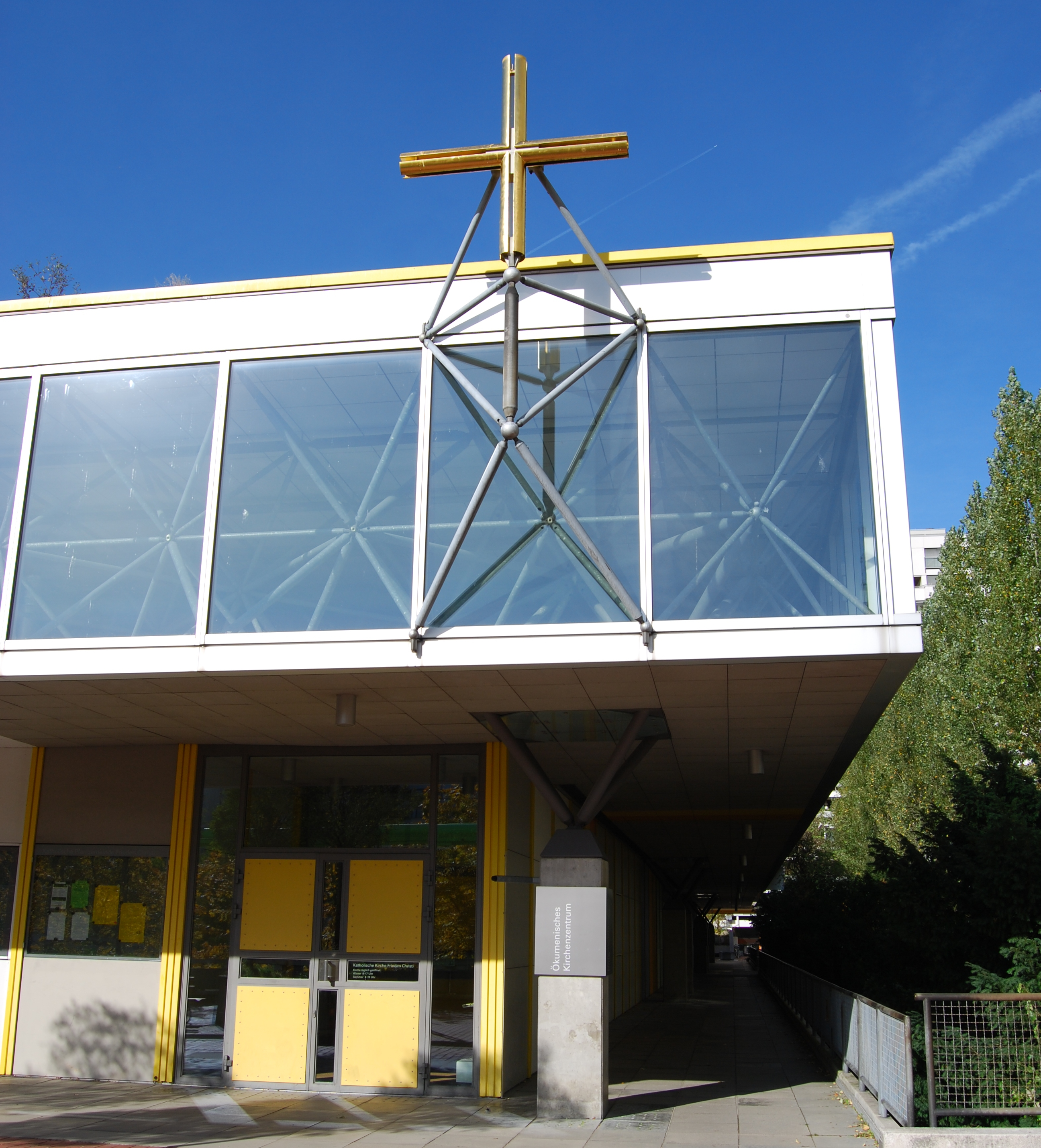 Kirchenzentrum im Olympiapark München, süd-östlicher Eingang der katholischen Kirche Frieden Christi